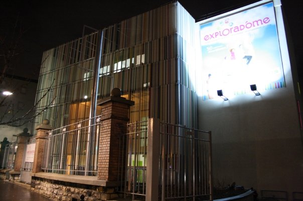 Façade de l'Exploradôme à Vitry-sur-Seine la nuit.